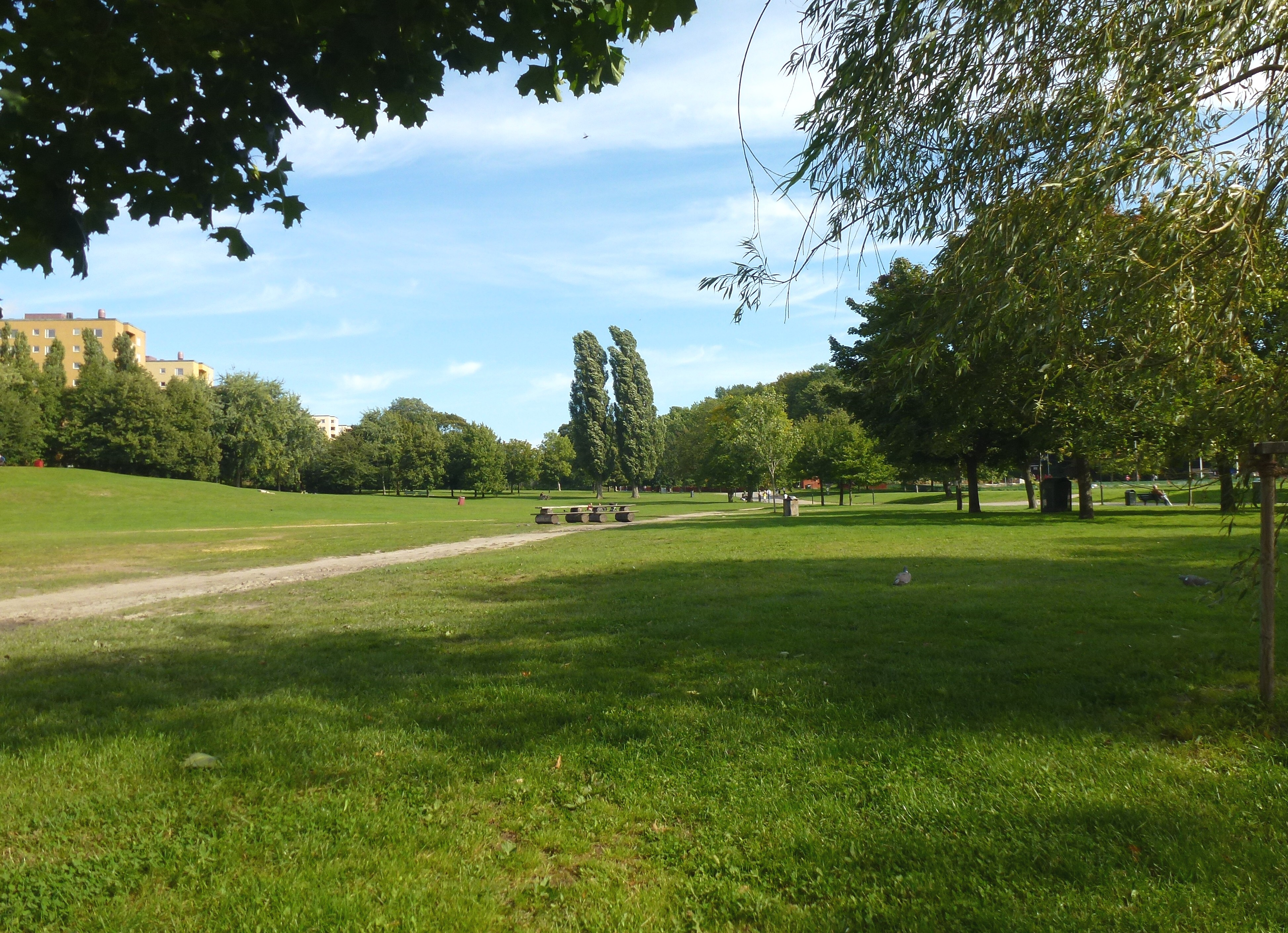 Drakenbergsparken